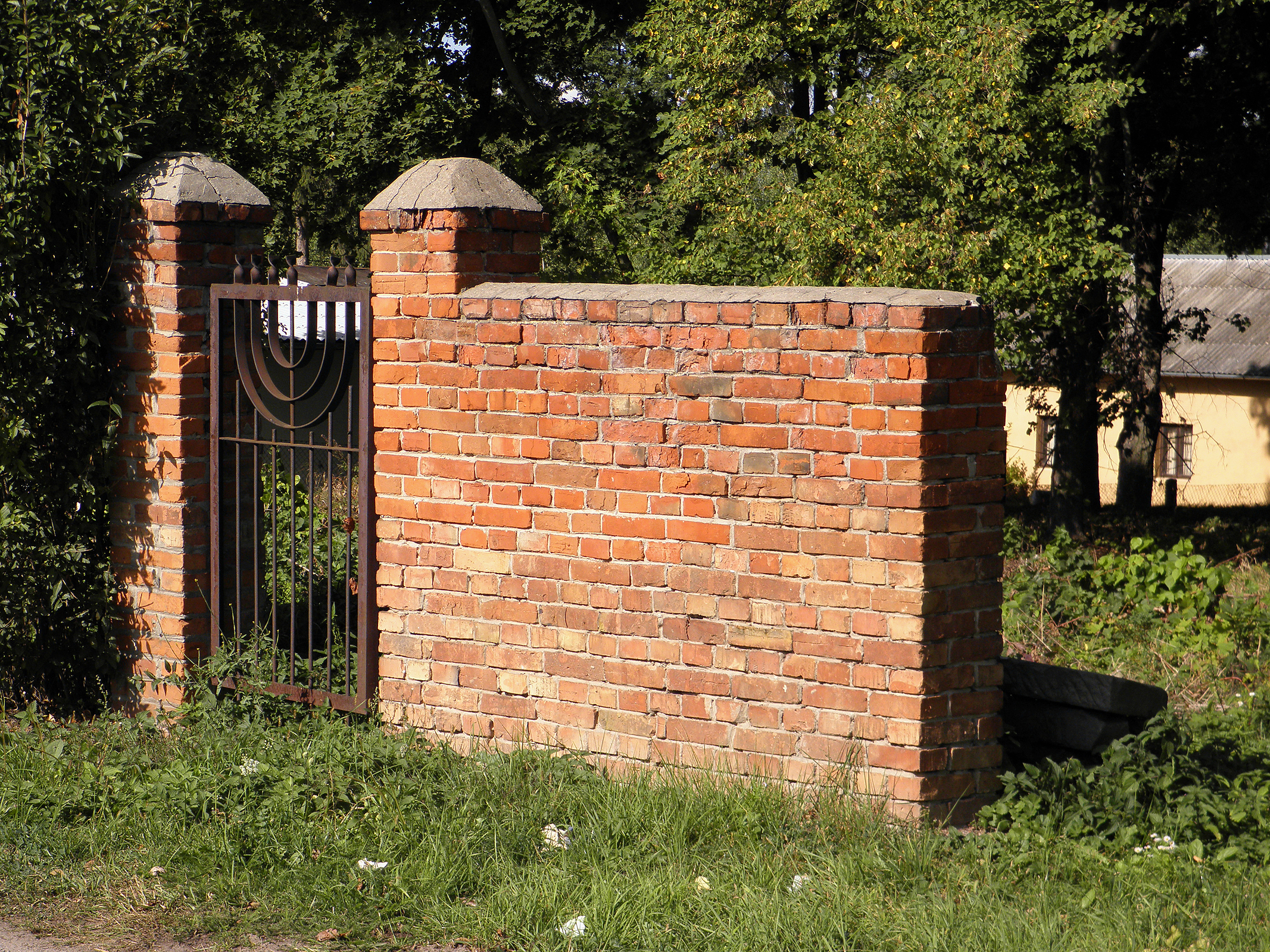 Symboliczna furtka na teren cmentarza żydowskiego w Siennie.